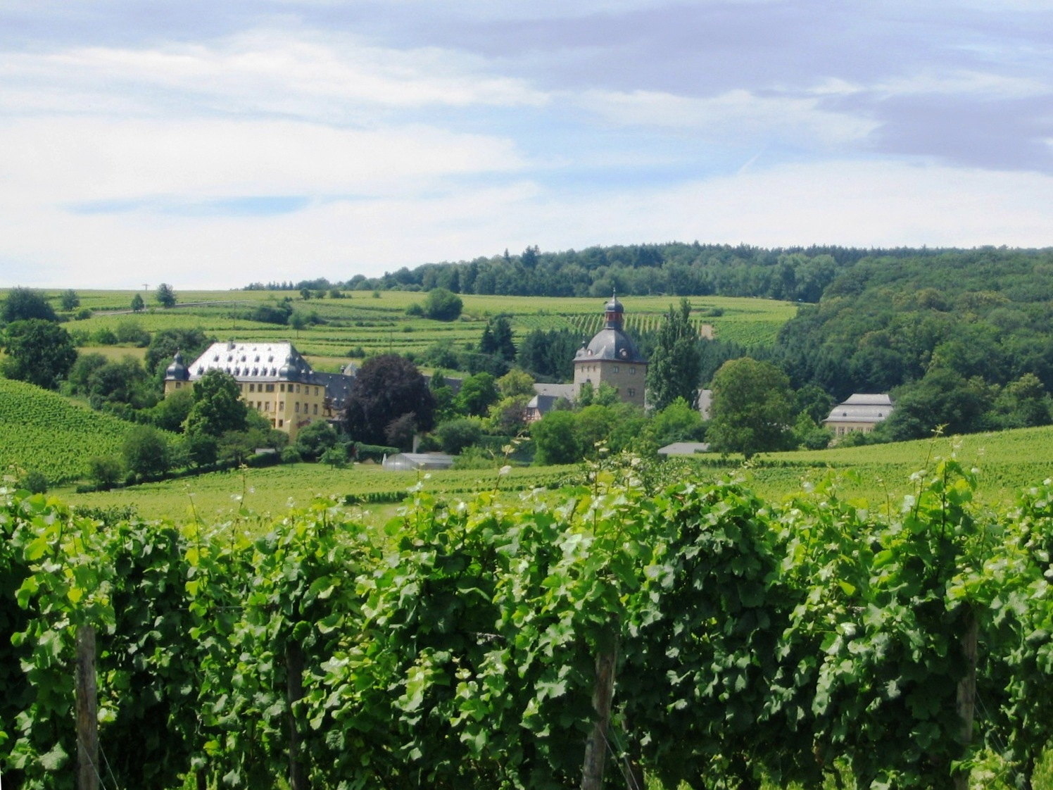 Gesamtansicht von Schloss Vollrads bei Winkel im Rheingau aus Südosten.